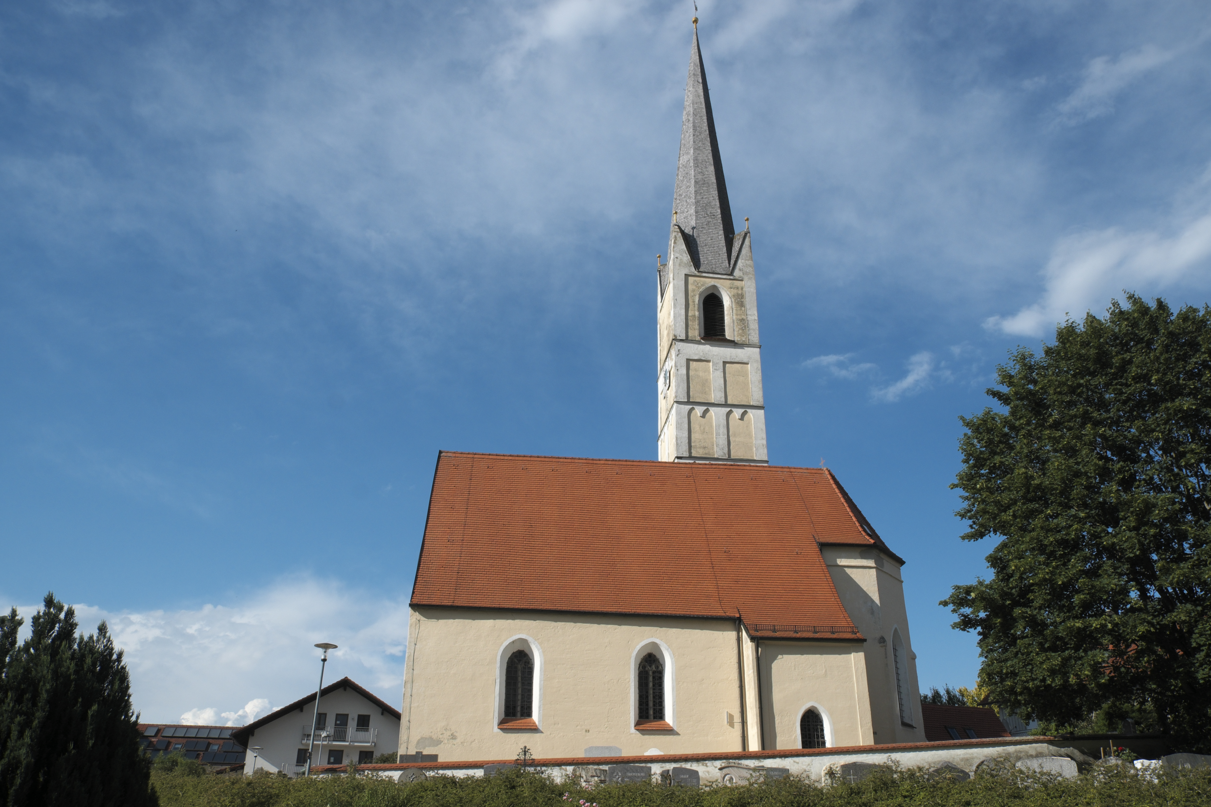 Katholische Filialkirche St. Remigius in Lappach (Sankt Wolfgang) im oberbayerischen Landkreis Erding (Bayern/Deutschland)